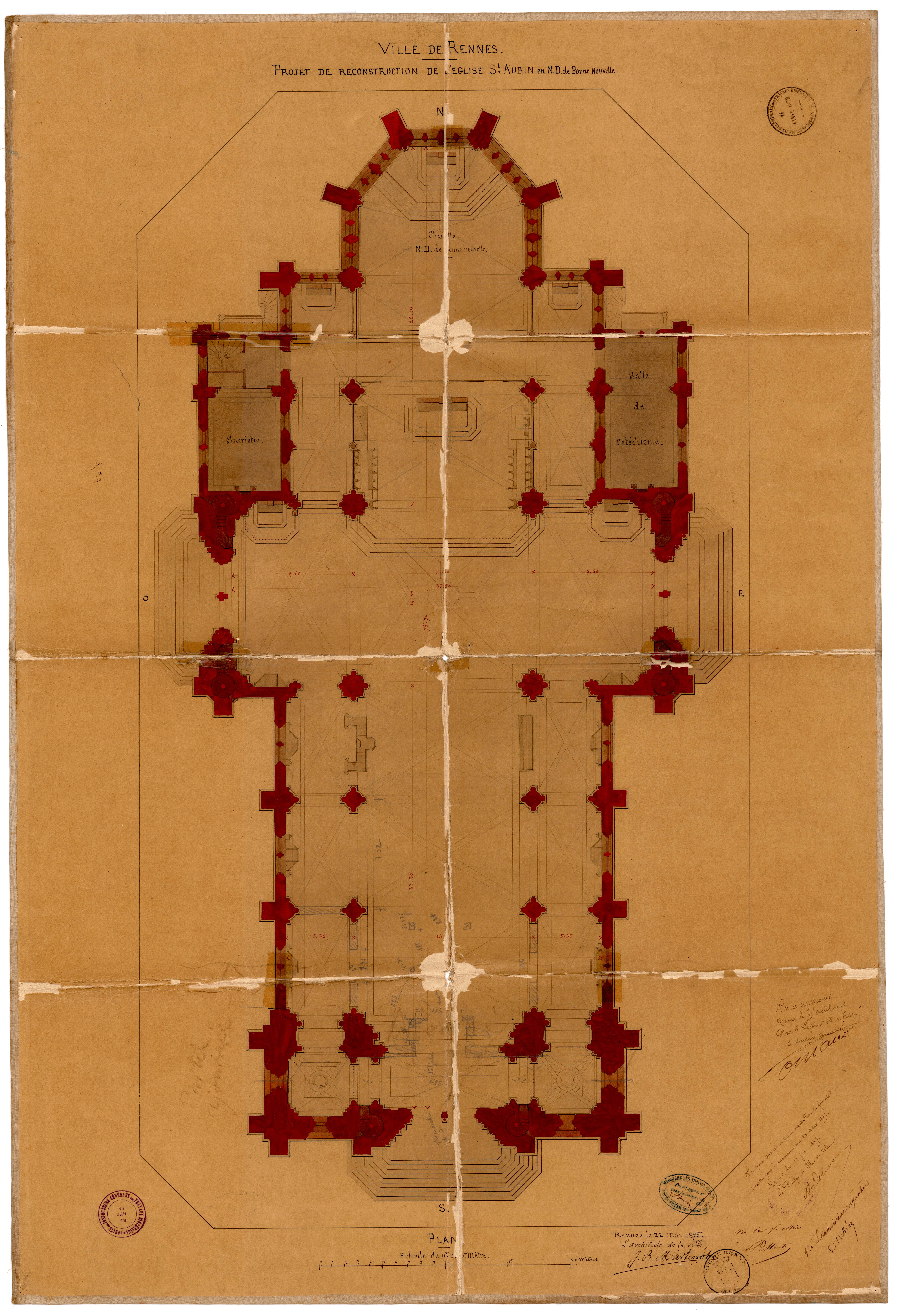 Plan du projet de reconstruction de l'église Saint-Aubin, Rennes. Archives municipales de Rennes, 2 Fi 1673.